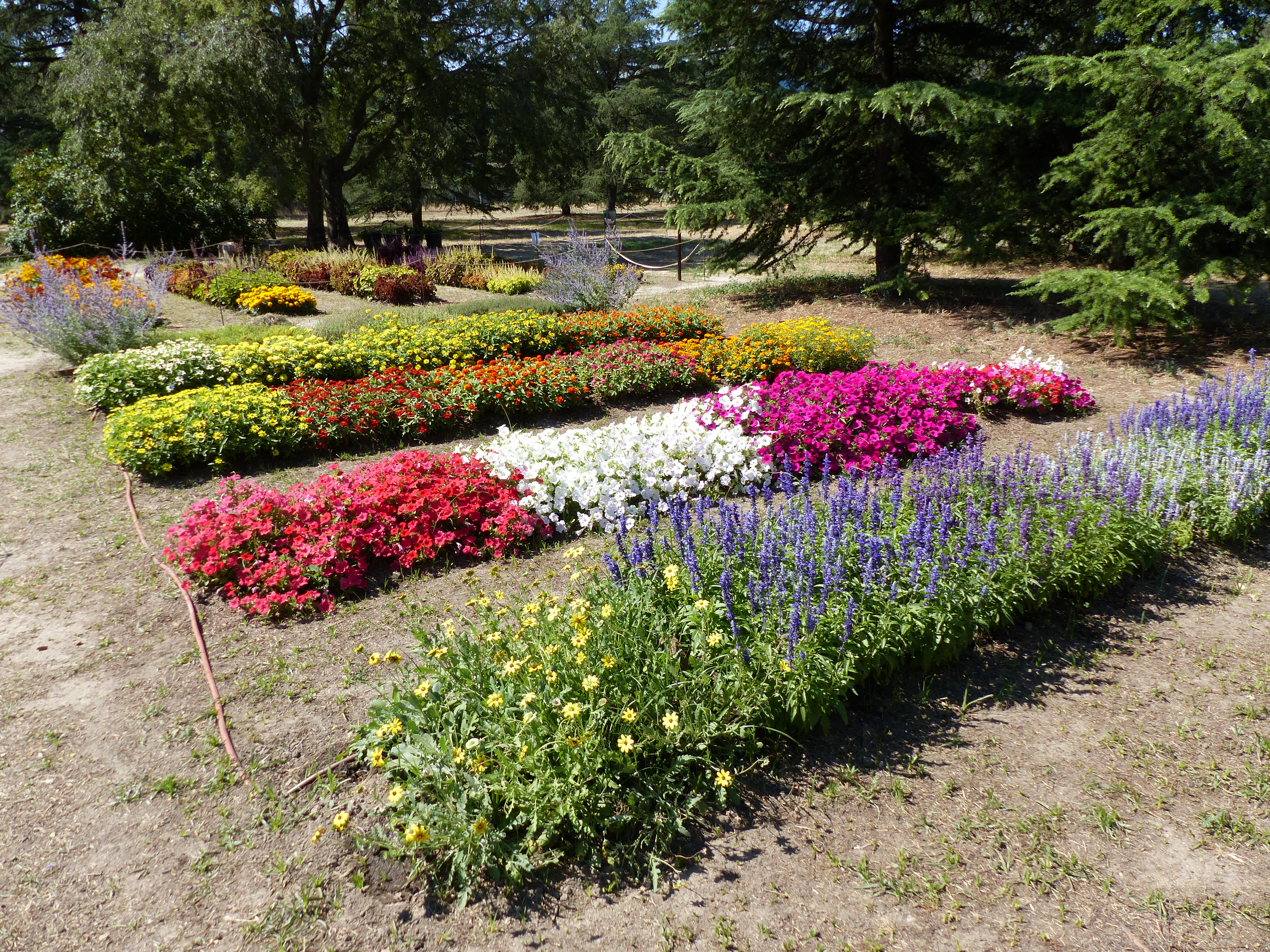 Parque Quinta de Torre Arias